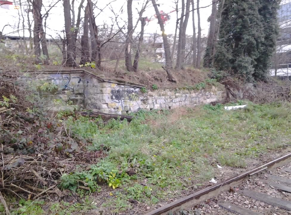 Gare de "Grenelles-Marchandises" (Paris 15e) - 4 janvier 2014.